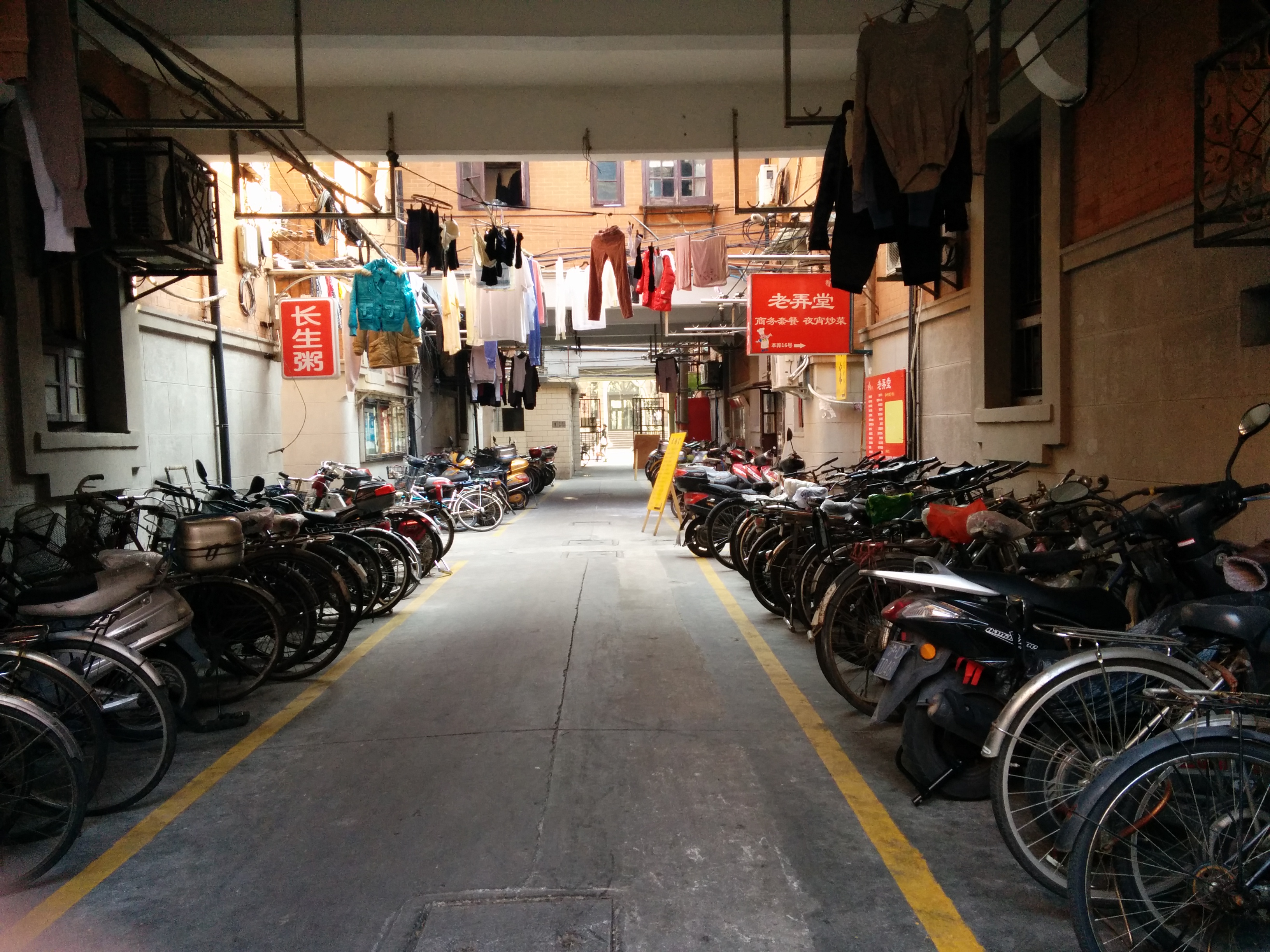 中文（中国大陆）: 尚贤坊主弄